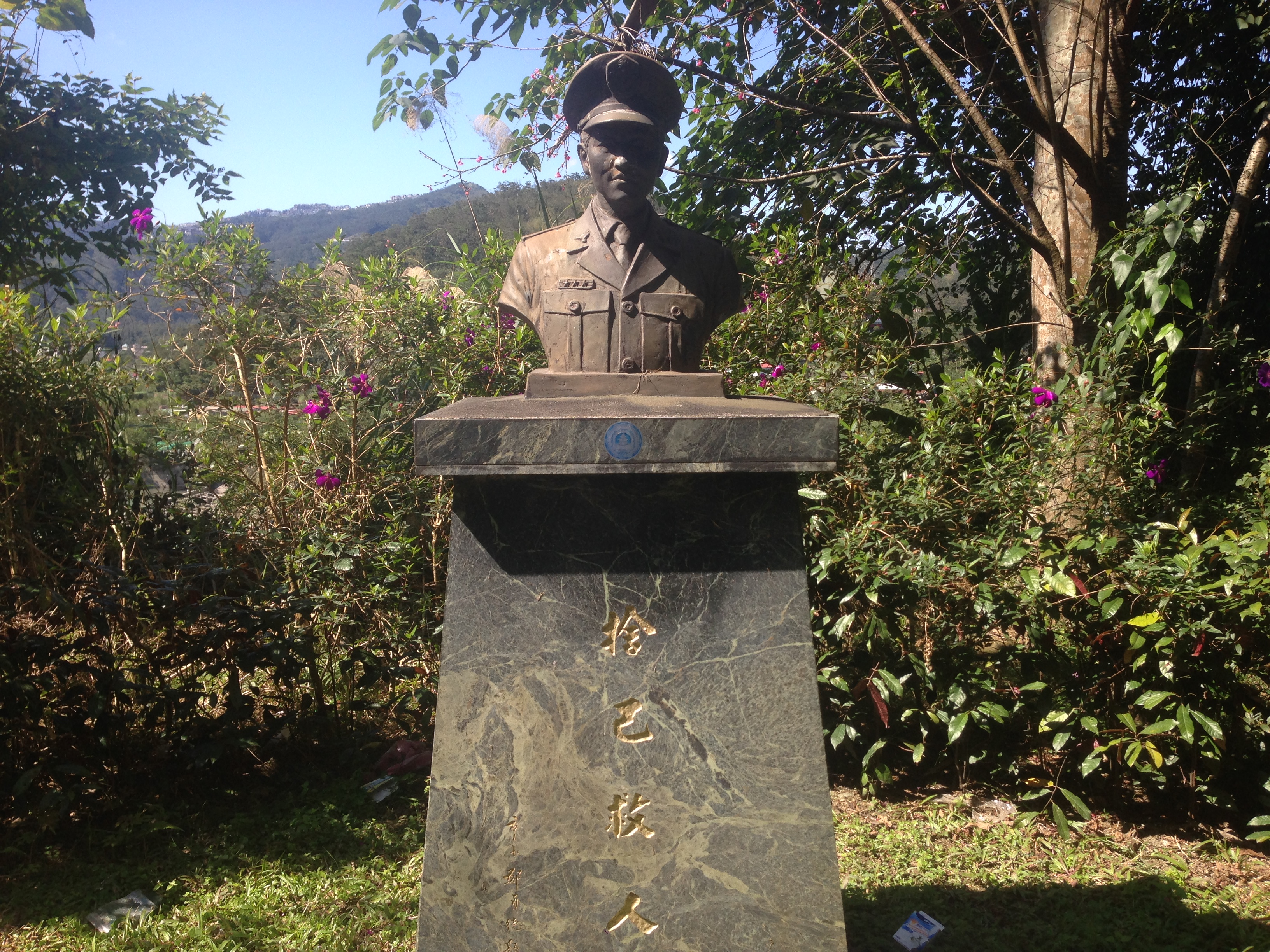 中文（台灣）: 李合豐銅像